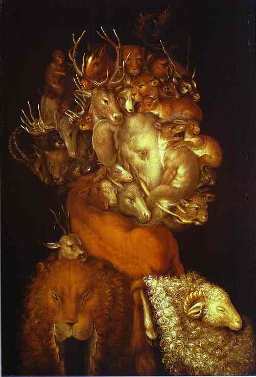 Elemento de la antigüedad